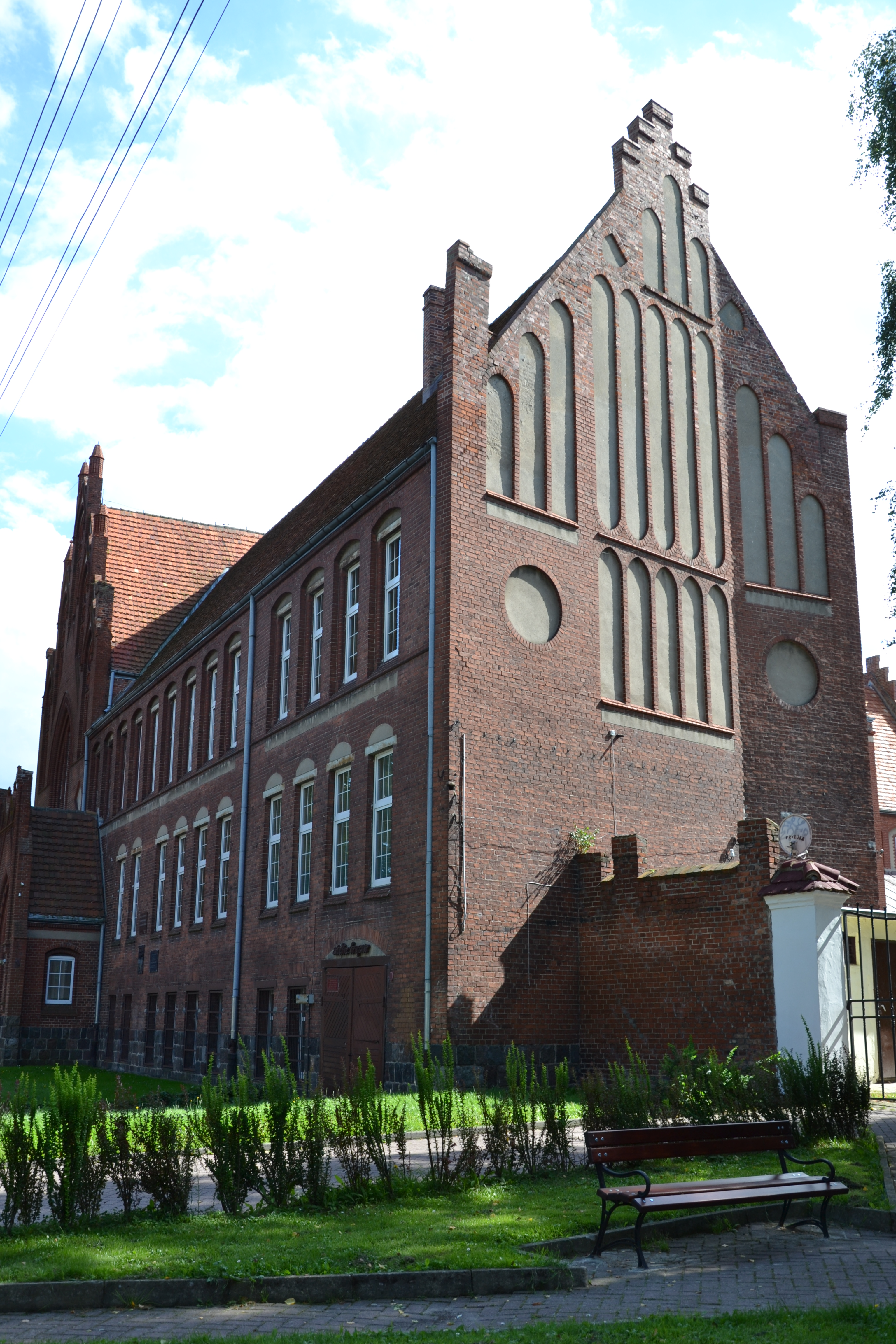 Szkoła w Kamieniu Pomorskim